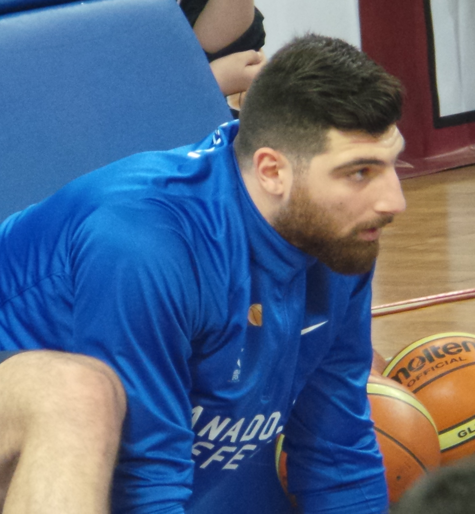 Deniz Kılıçlı